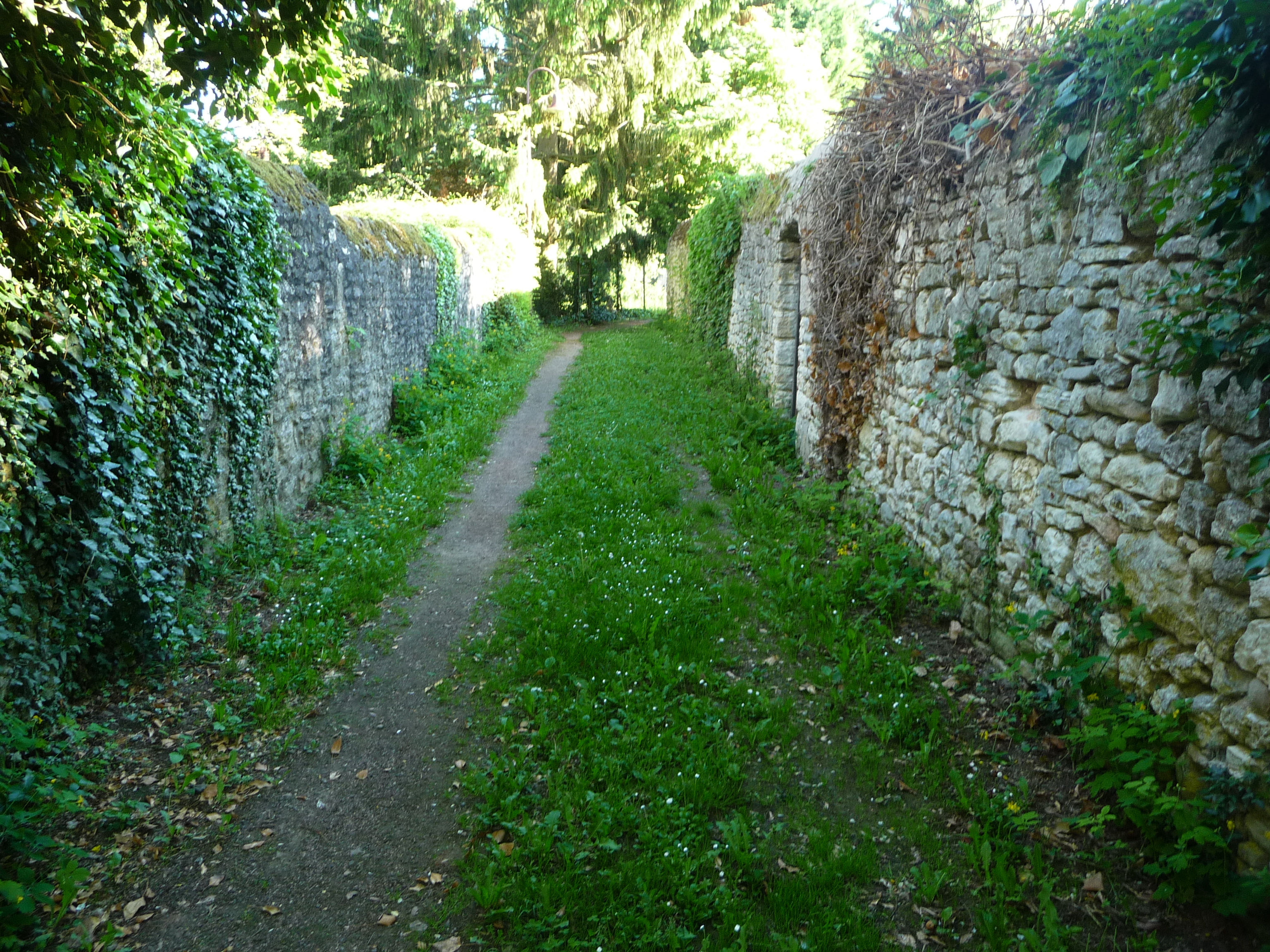 Eppelsheim ist eine Ortsgemeinde im Landkreis Alzey-Worms in Rheinland-Pfalz.